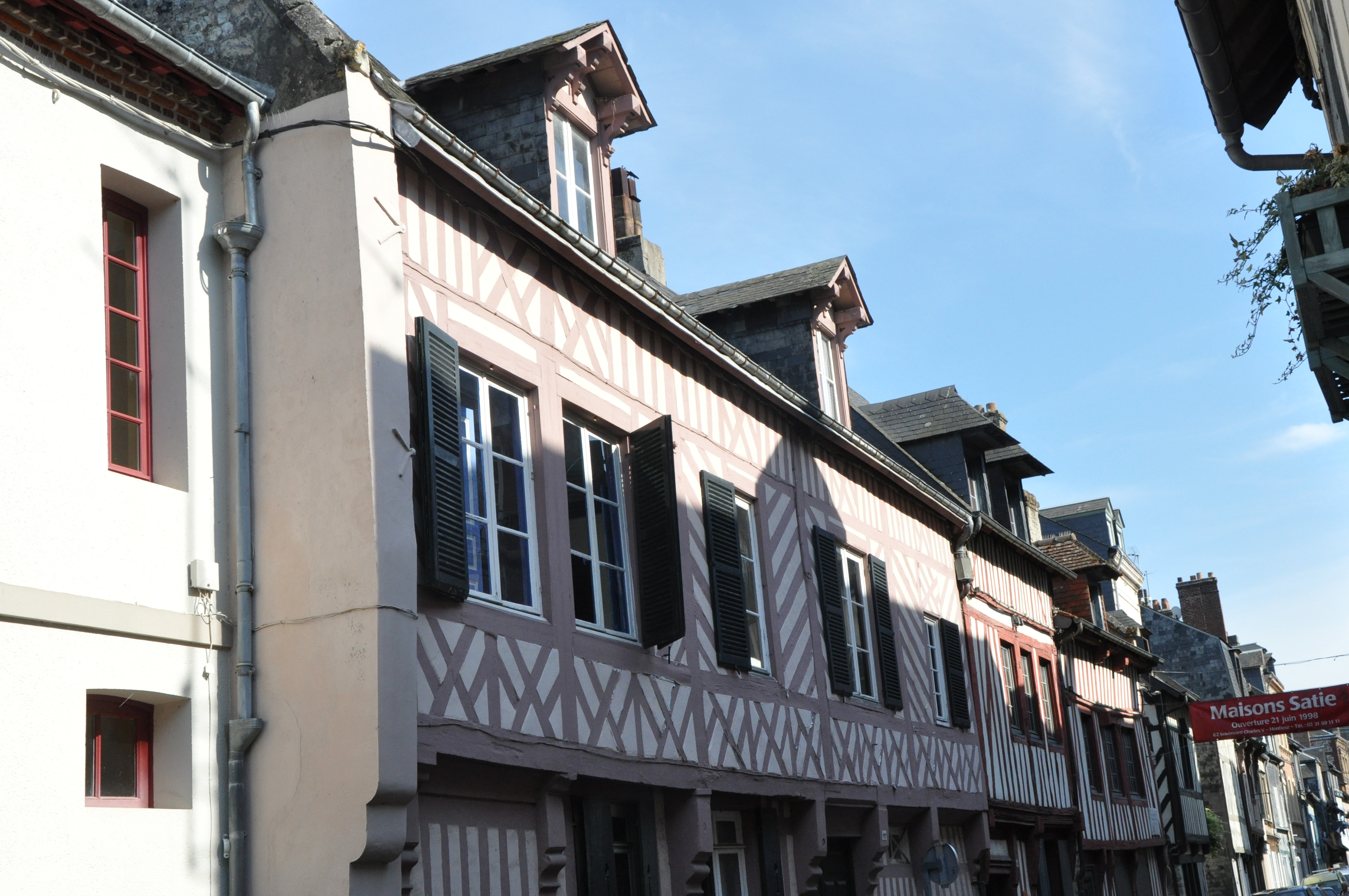 Propriété de Paul-Élie Gernez, rue Haute à Honfleur (Calvados, 14)